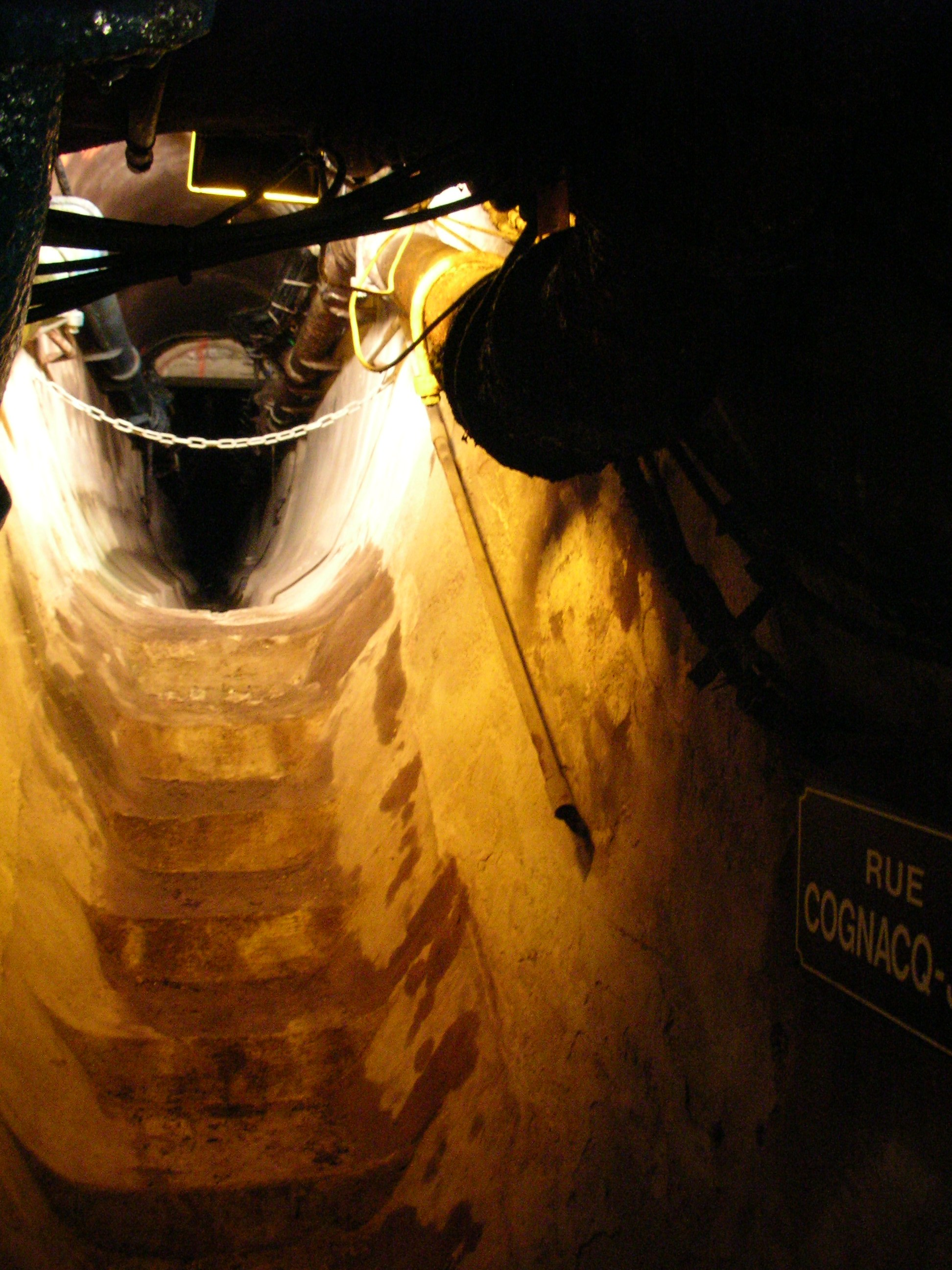 Una delle vie sotterranee delle fogne di Parigi Immagine realizzata da pnc_net.